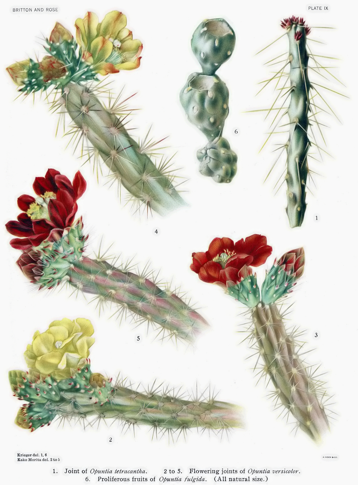 1. Cylindropuntia tetracantha 2-5. Cylindropuntia versicolor, 6. Cylindropuntia fulgida.